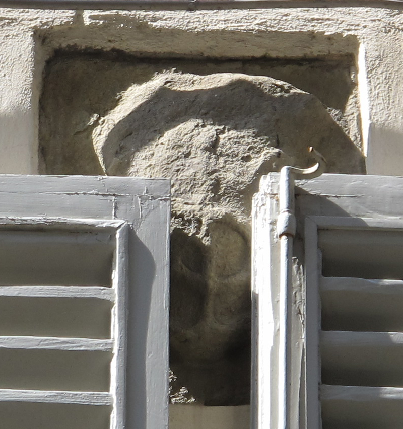 Firenze, miscellanea